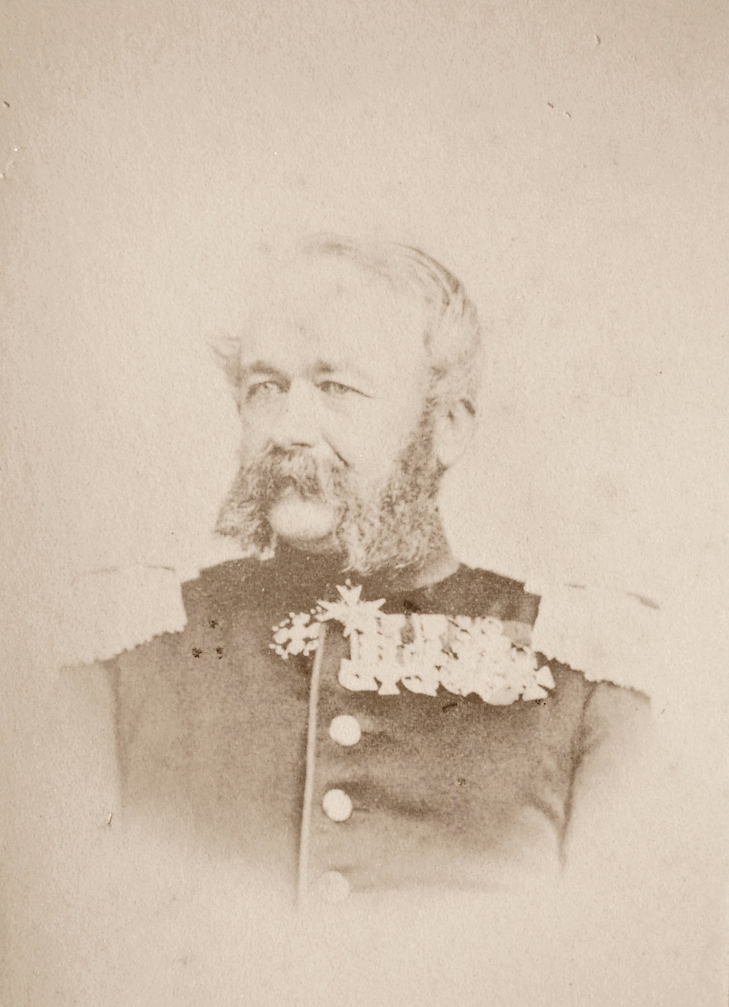 General Bruno von Francois